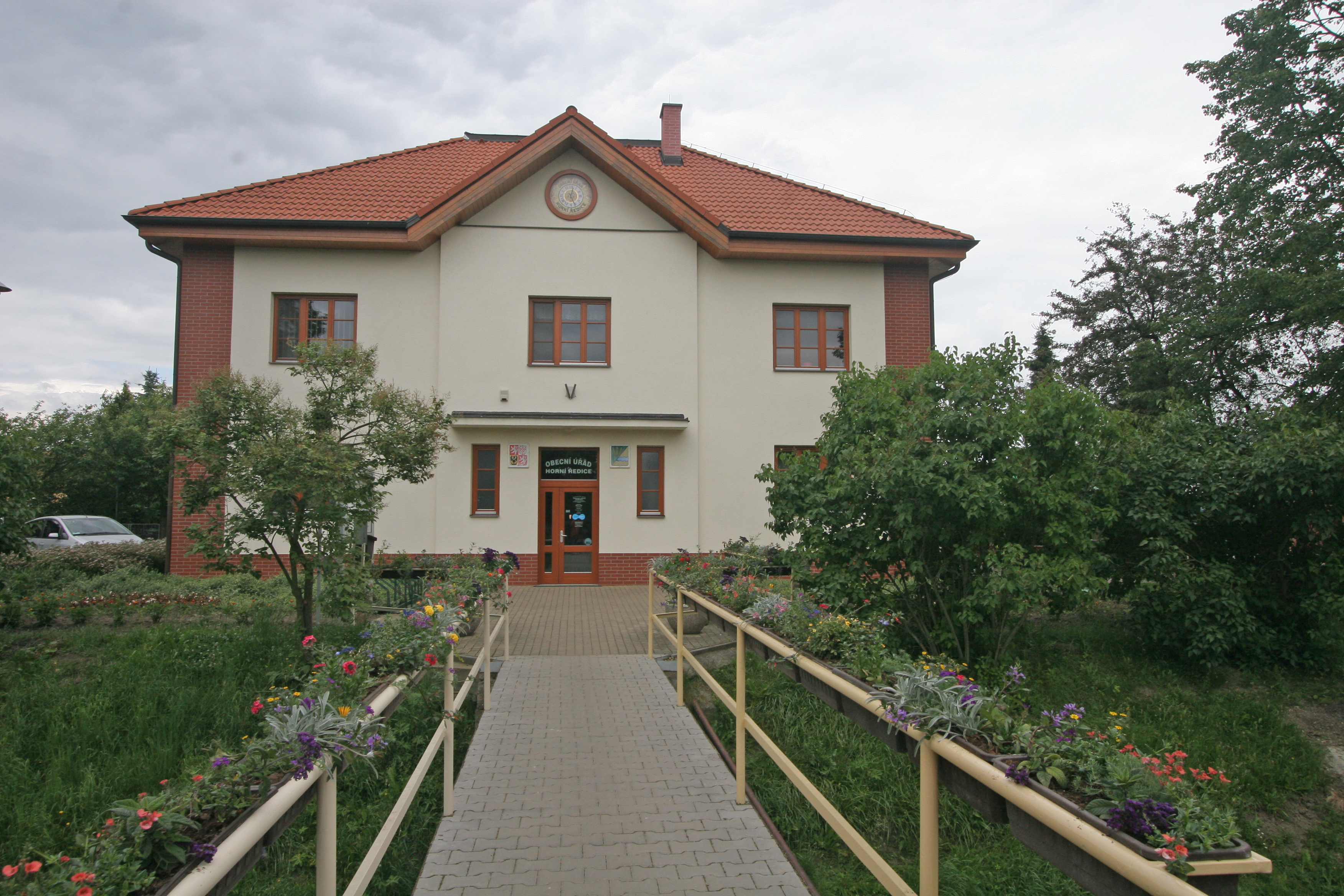 Horní Ředice obecní úřad